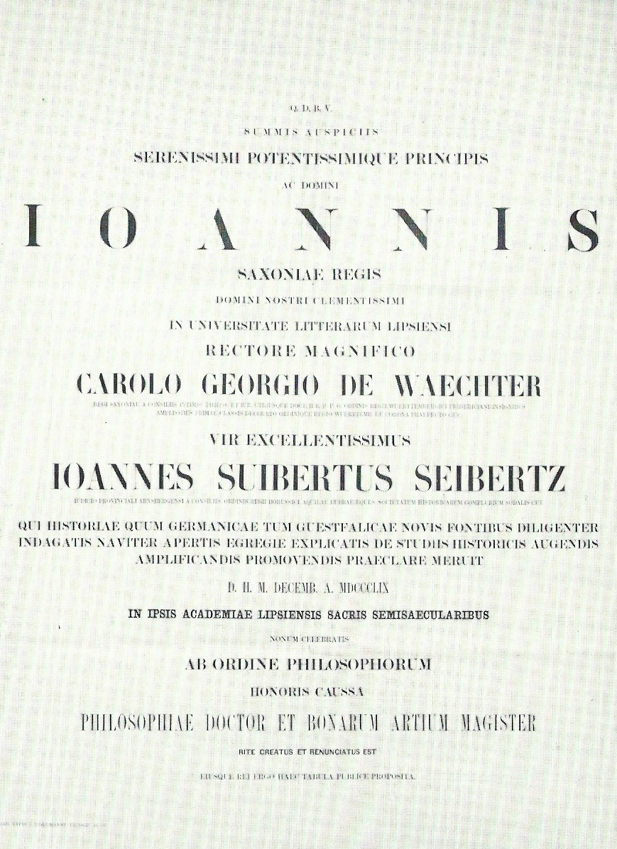 Hohann Suibert Seibertz, Ehrendoktordiplom der philosophischen Fakultät der Universität Leipzig